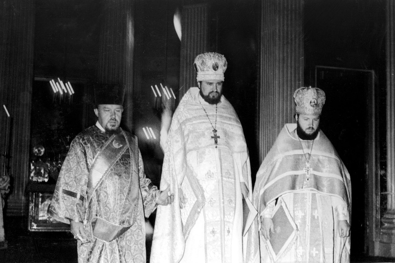 Хиротония епископа Антония (Завгороднего)